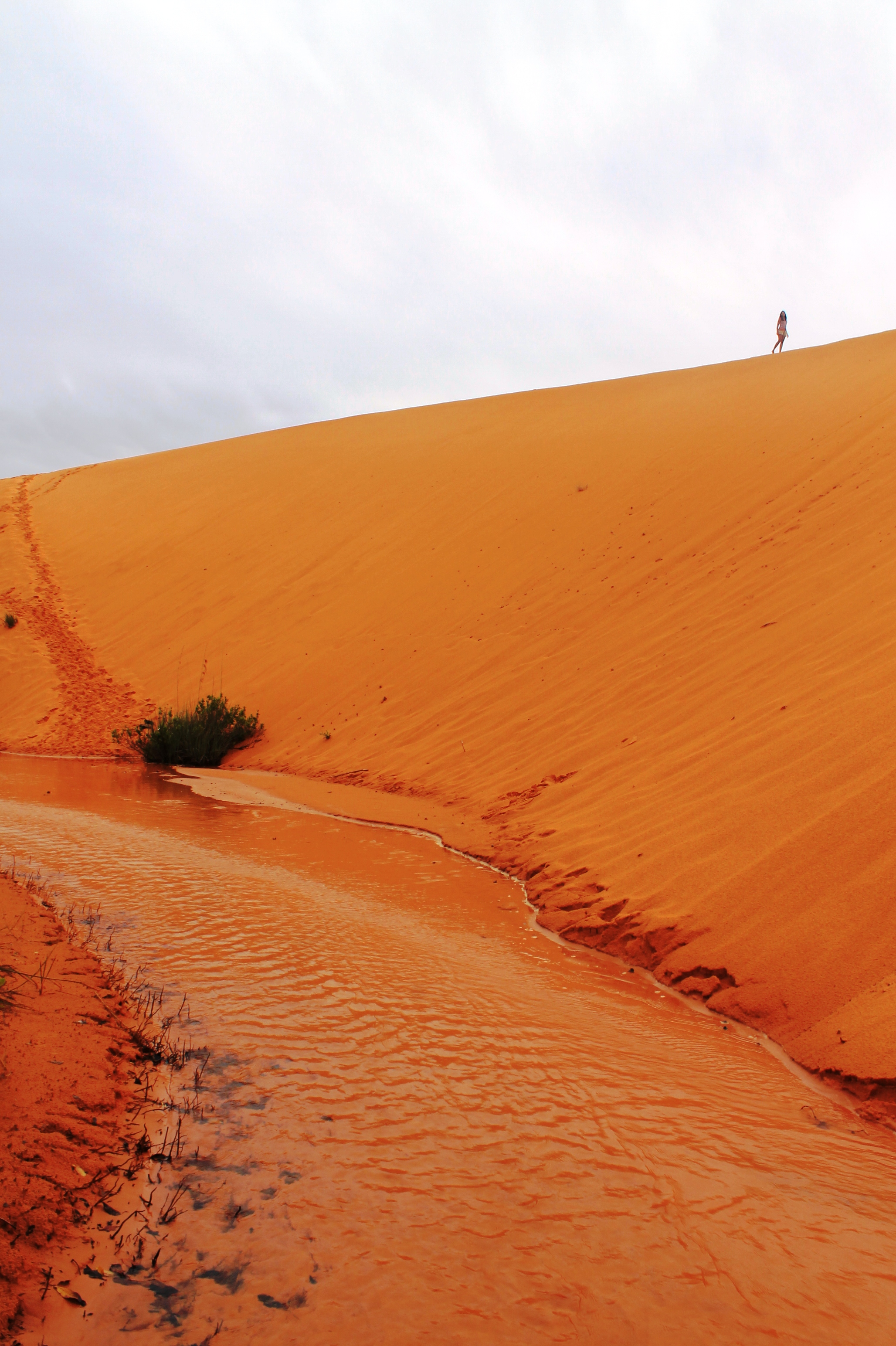 Dunas do deserto do Jalapão